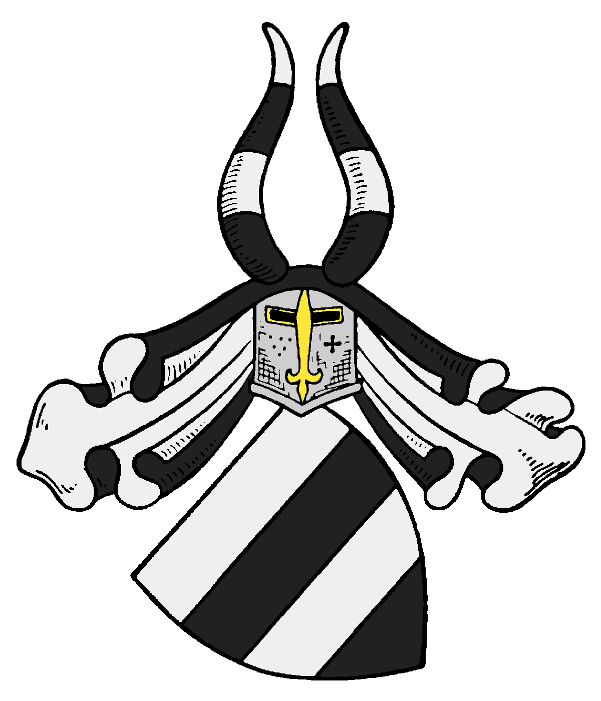 Wappen der Knuthonen